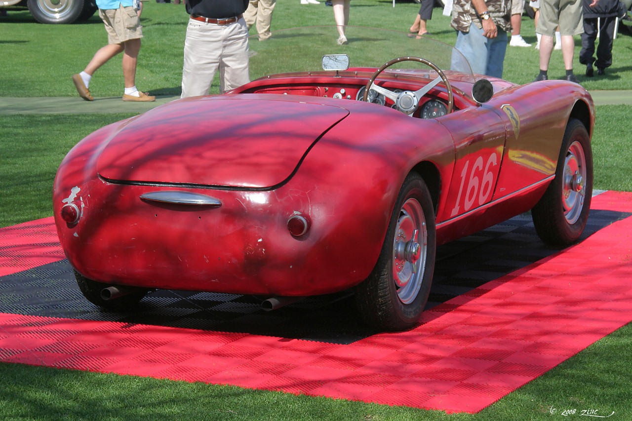 1948 Ferrari 166 MM Barchetta - chassis 01C - rvr